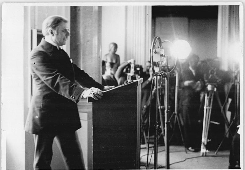 Berlin, Große Kunstausstellung, Eröffnung Baluschek eröffnet die Große Berliner Kunstausstellung im Schloss Bellevue. 13931-31 Abgebildete Personen: Baluschek, Hans Prof.: Maler, Grafiker, Deutschland